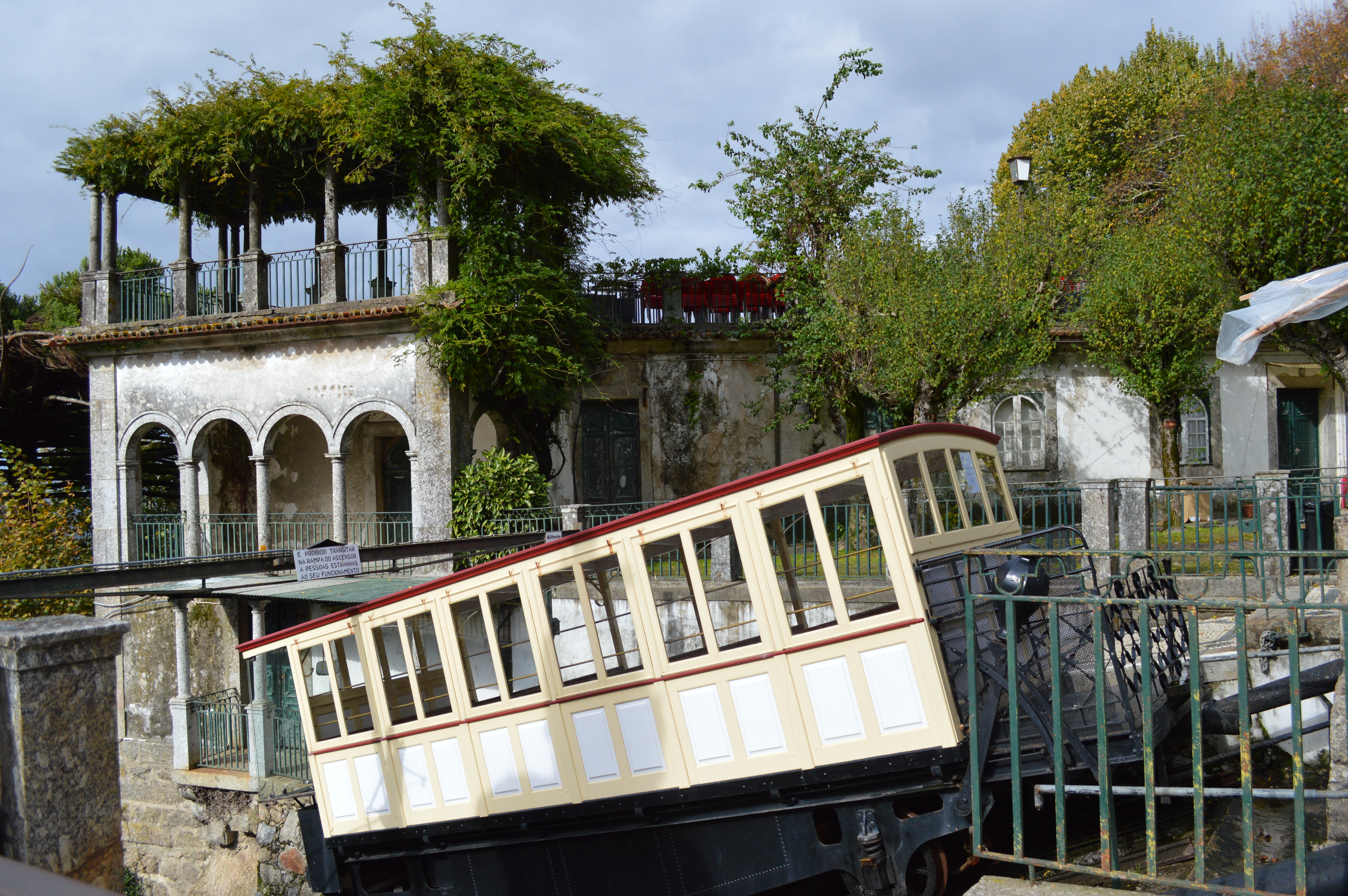 Elevador Hidráulico